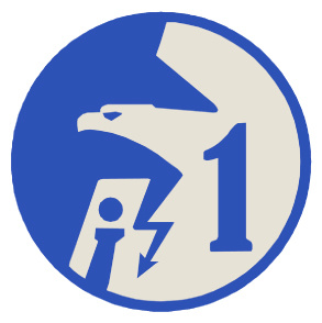 WZÓR GRAFICZNY OZNAKI ROZPOZNAWCZEJ 1. REJONU WSPARCIA TELEINFORMATYCZNEGO SIŁ POWIETRZNYCH NA MUNDUR WYJŚCIOWY